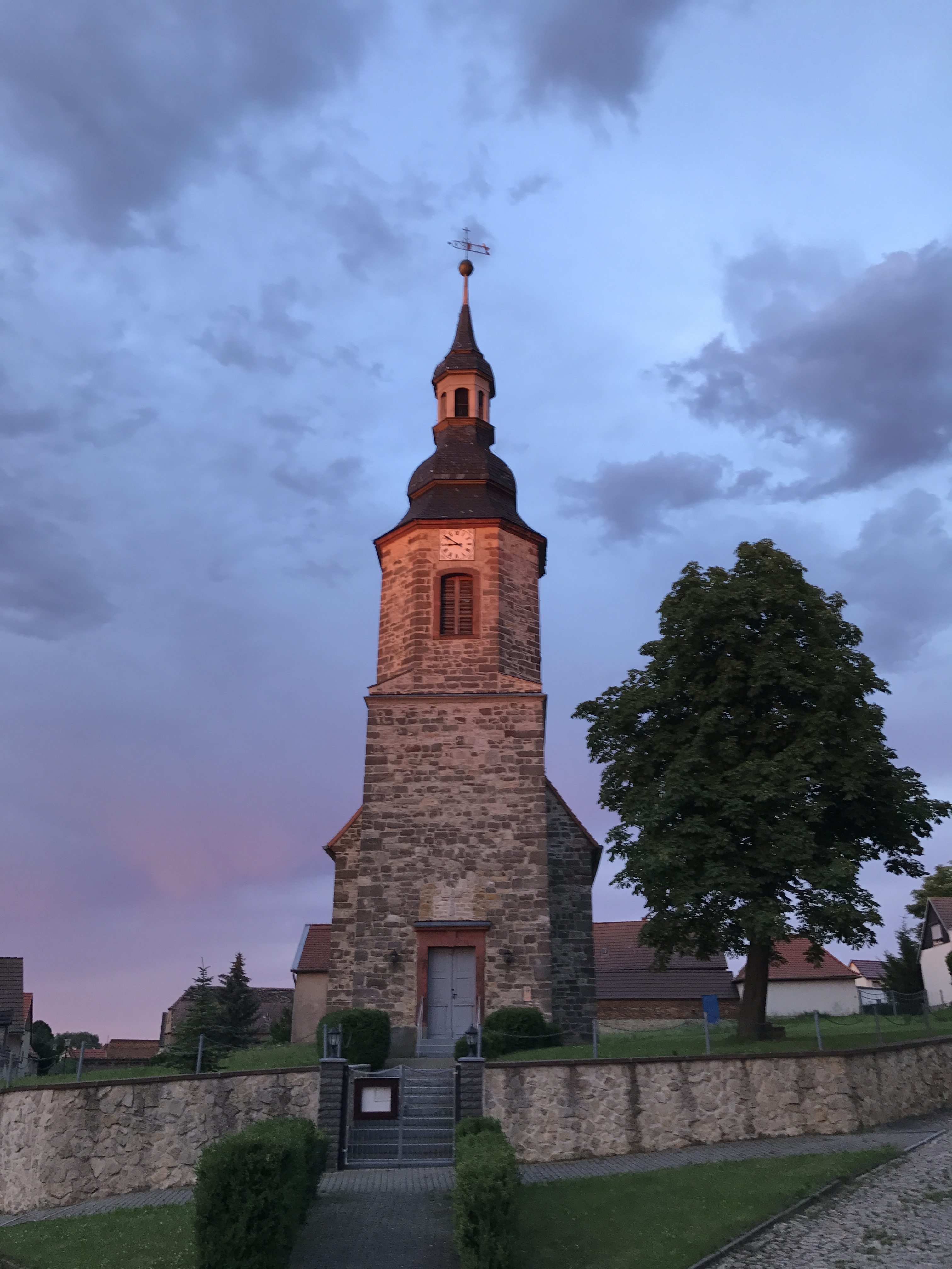 Kirche Oechlitz, Kirchplatz